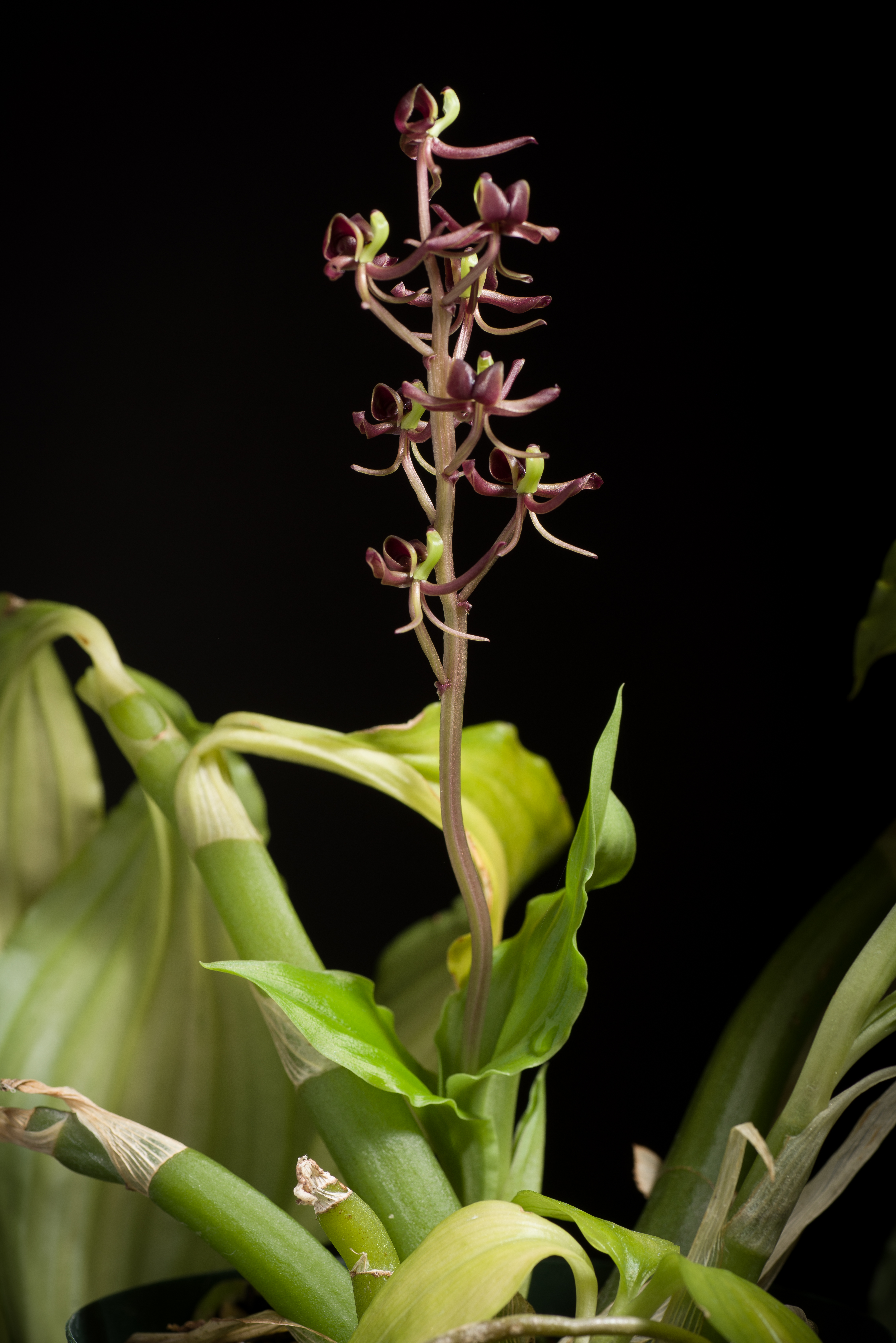 Liparis formosana - (Japan , Higashison Okinawa)